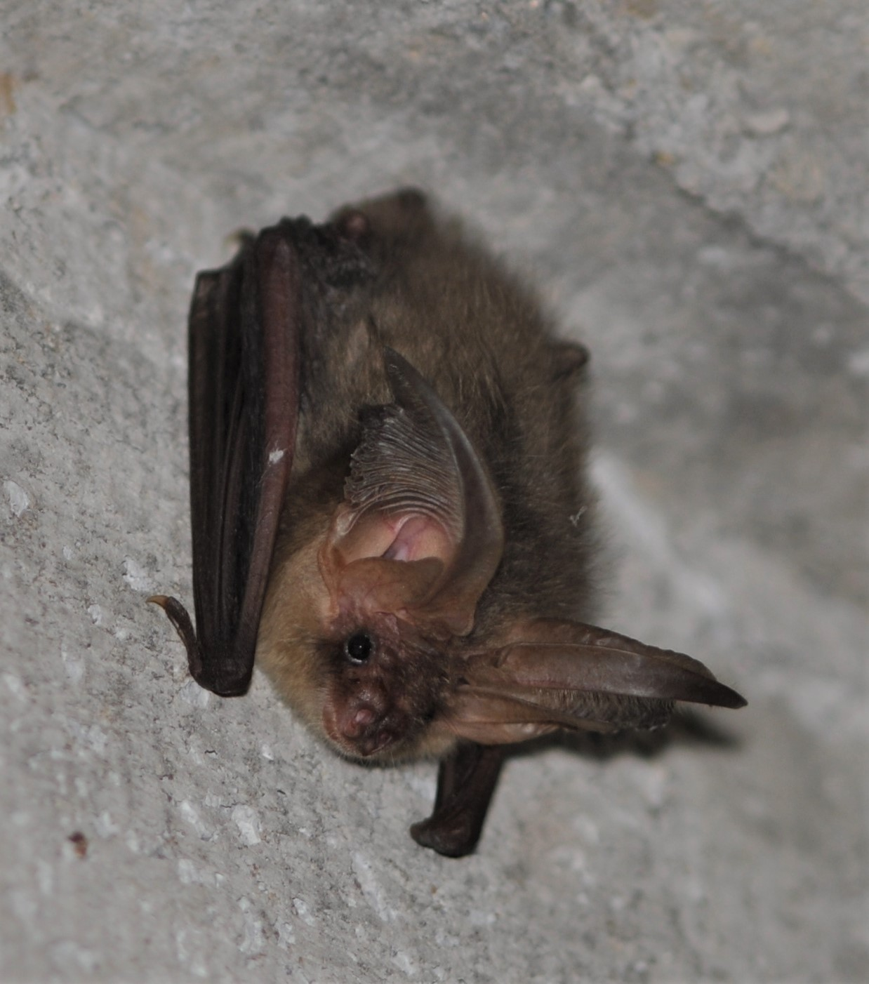 Alias Oreillard roux, merci @chamsz